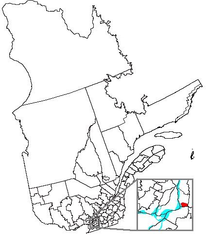 Volapük: Topam in provin: Québec.